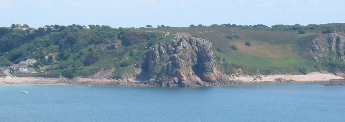 Nrf: La Cotte dé Saint Brélade, Saint Brélade, Jèrri, 28 d'Juîn 2009